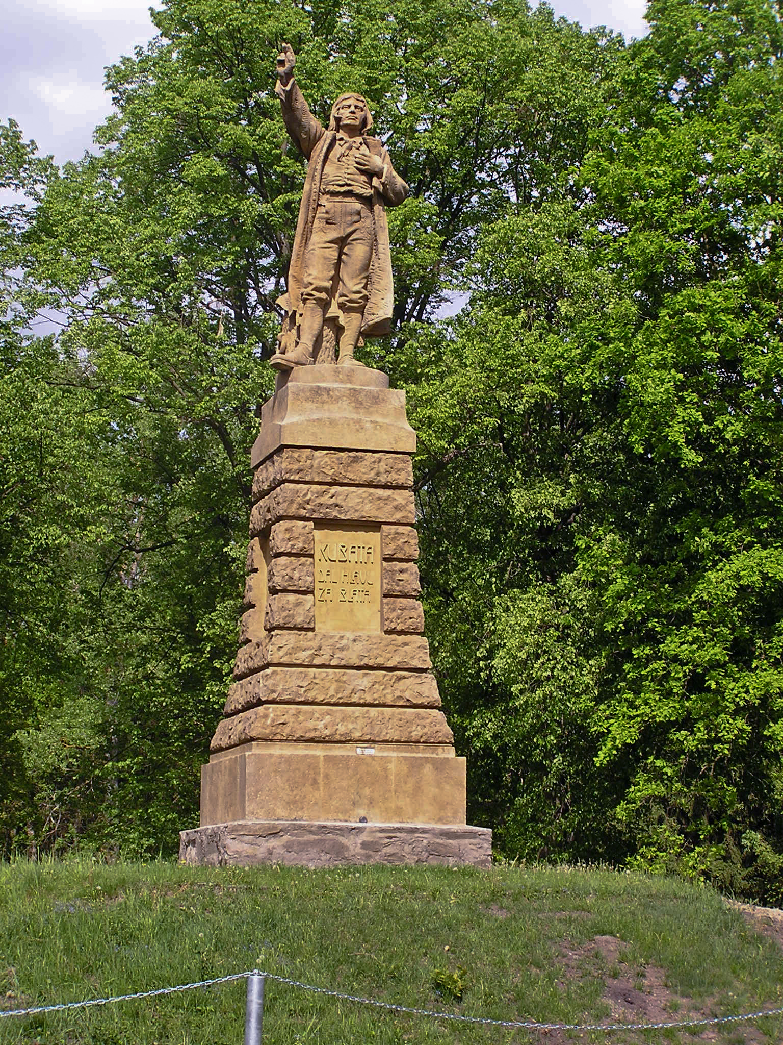 Pomník Kubatův (Zbudov), J od vsi u železniční trati, Zbudov